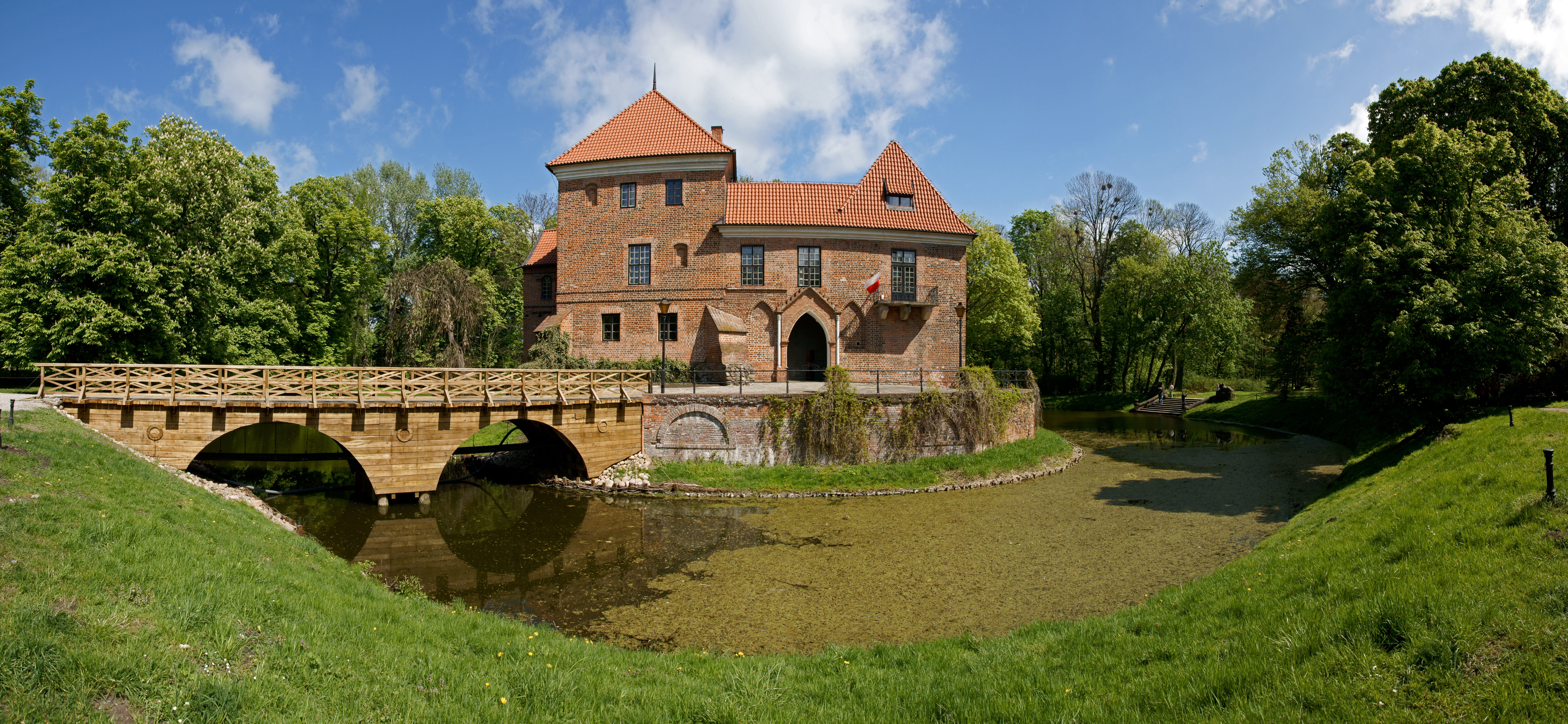 Gotycki zamek Oporowskich. Obecnie Muzeum Zamek w Oporowie.